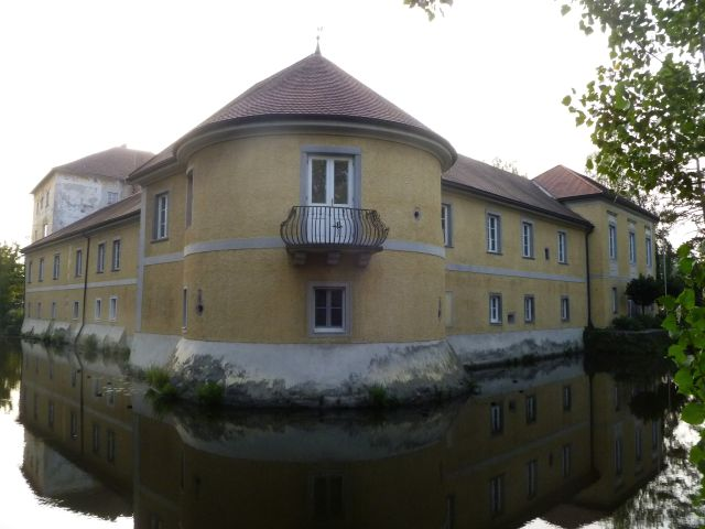 Schloss_Weidenholz-Turm